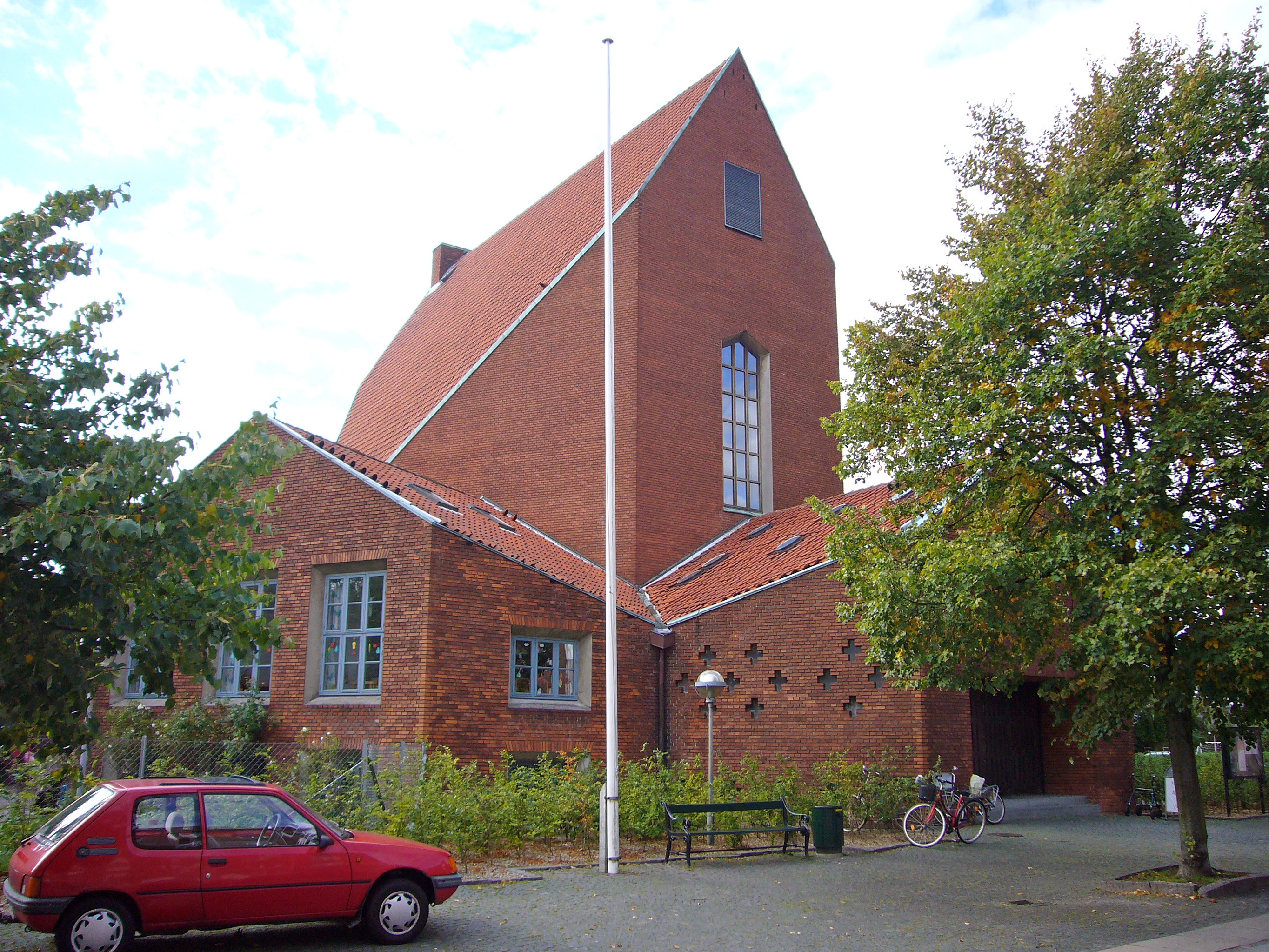 Hyltebjerg Kirke, Vanløse, Copenhagen, Denmark. Hyltebjerg Kirke